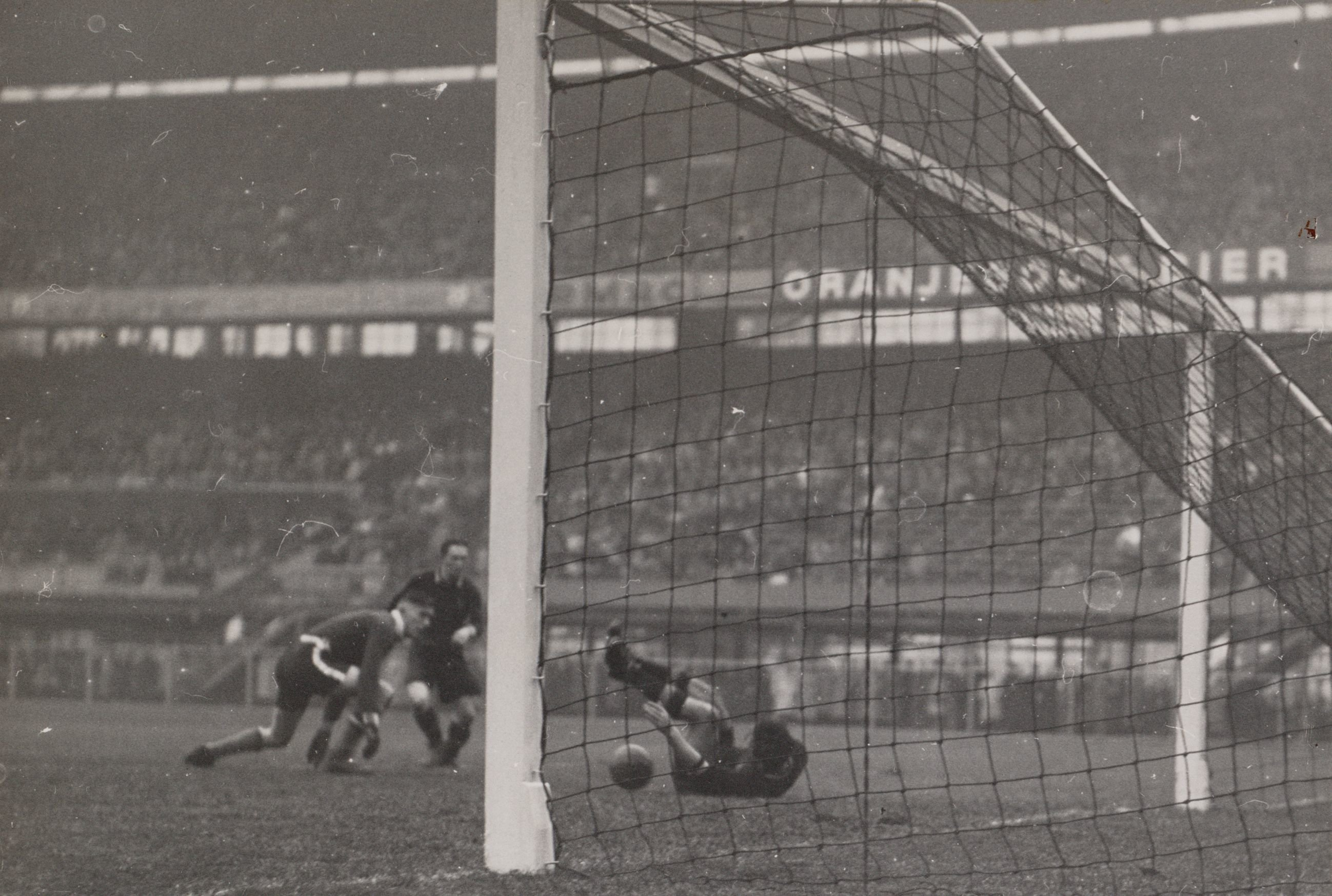 Merkwaardig moment voor het Nederlandse doel. Doelman Michel (links) is gepasseerd, maar een Belgische aanvaller ligt in de weg.Nederland - België, gespeeld op 10 december 1939 in het Feyenoord-stadion (De Kuip) te Rotterdam, ter gelegenheid van het 50-jarig bestaan van de KNVB.